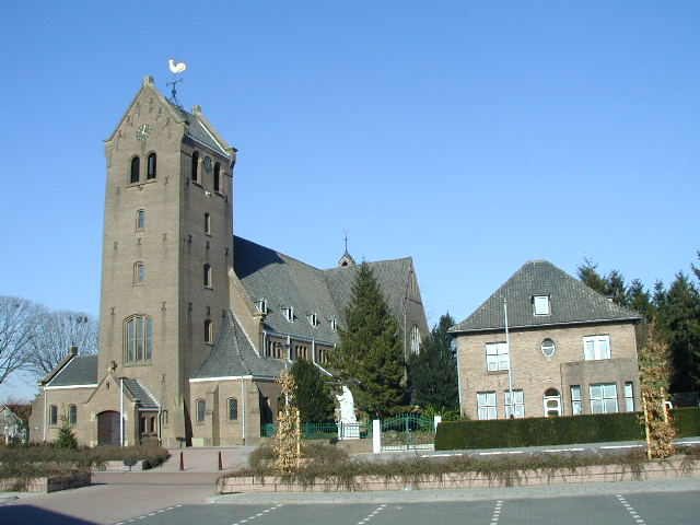 Foto zelf gemaakt op 23 maart 2003. Keunen